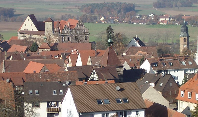 Cadolzburg, Burg und Kirche vom Aussichtsturm